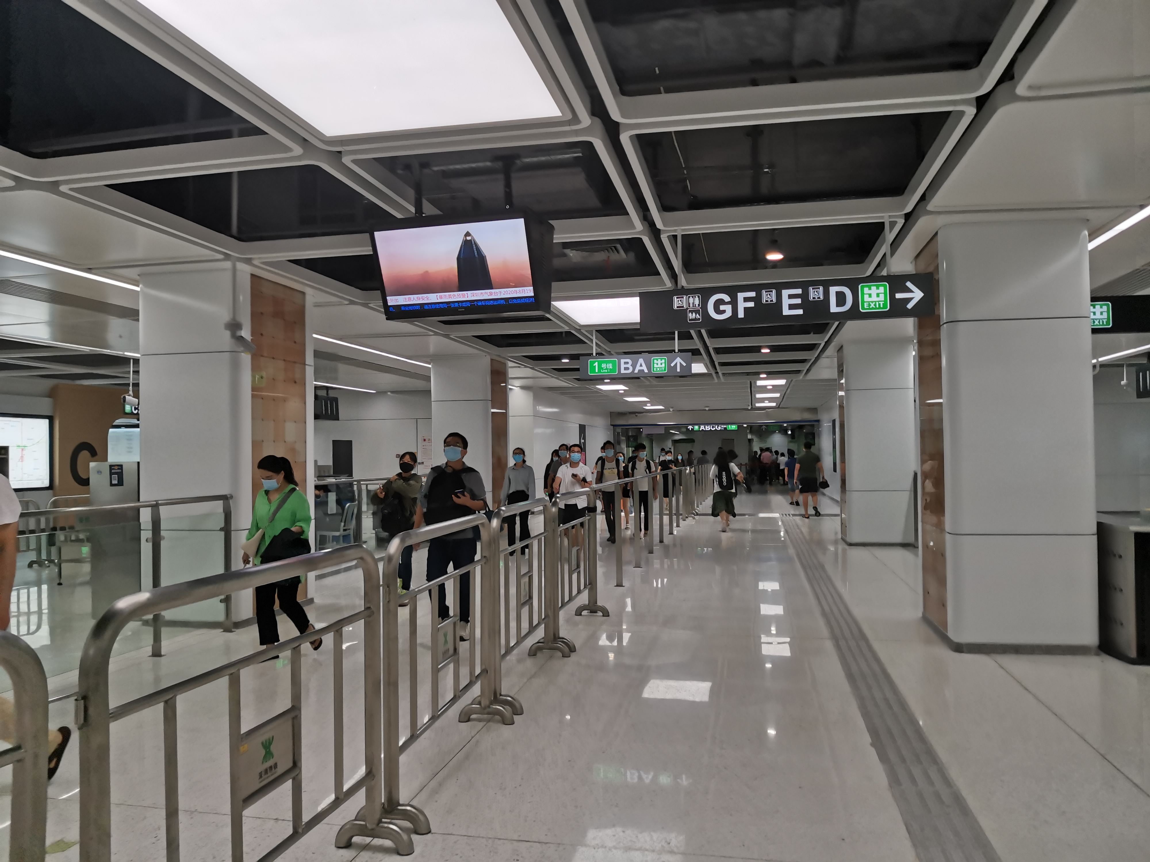 深圳地铁10号线岗厦站站厅